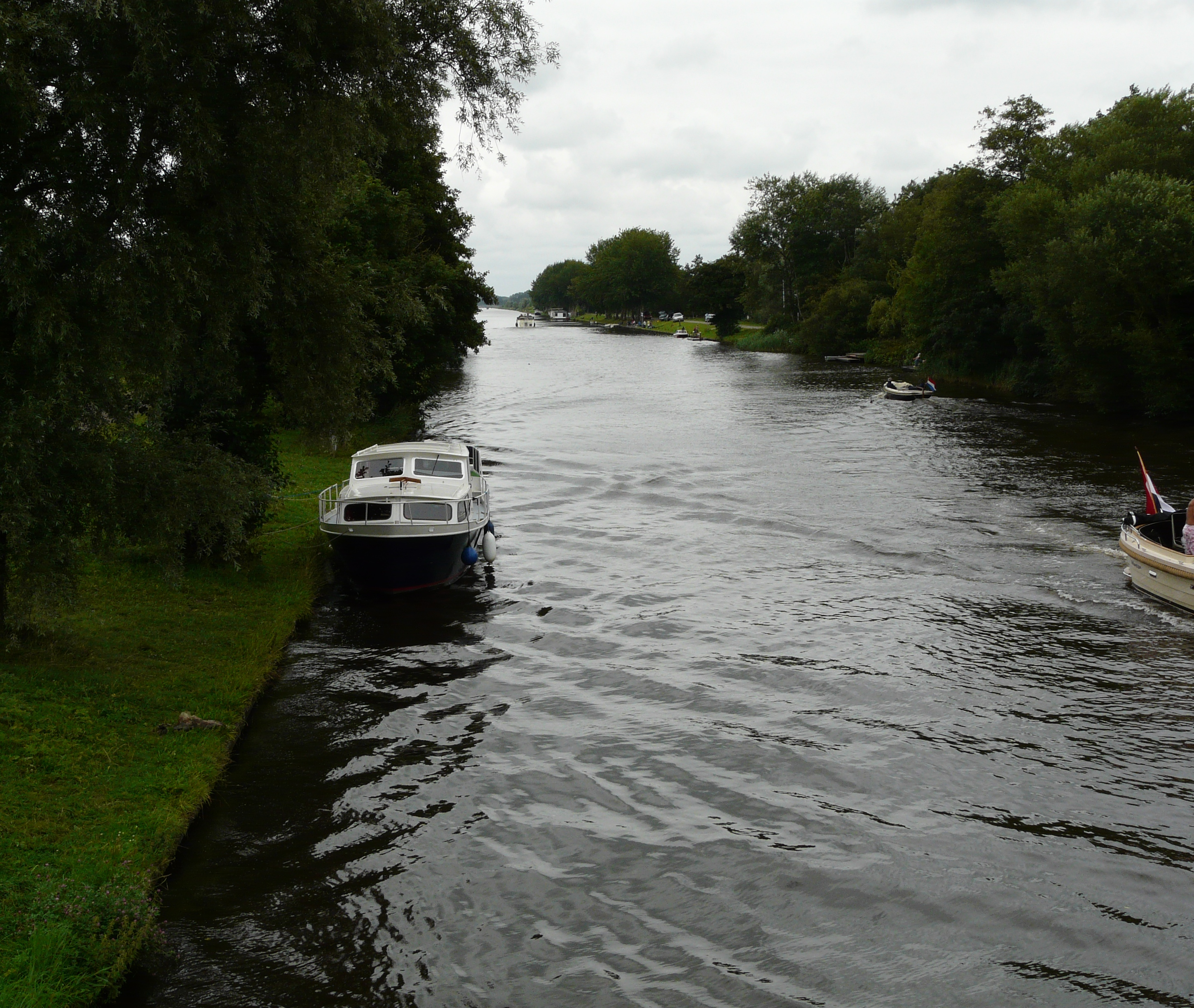 De Nije Swemmer by Westergeast.